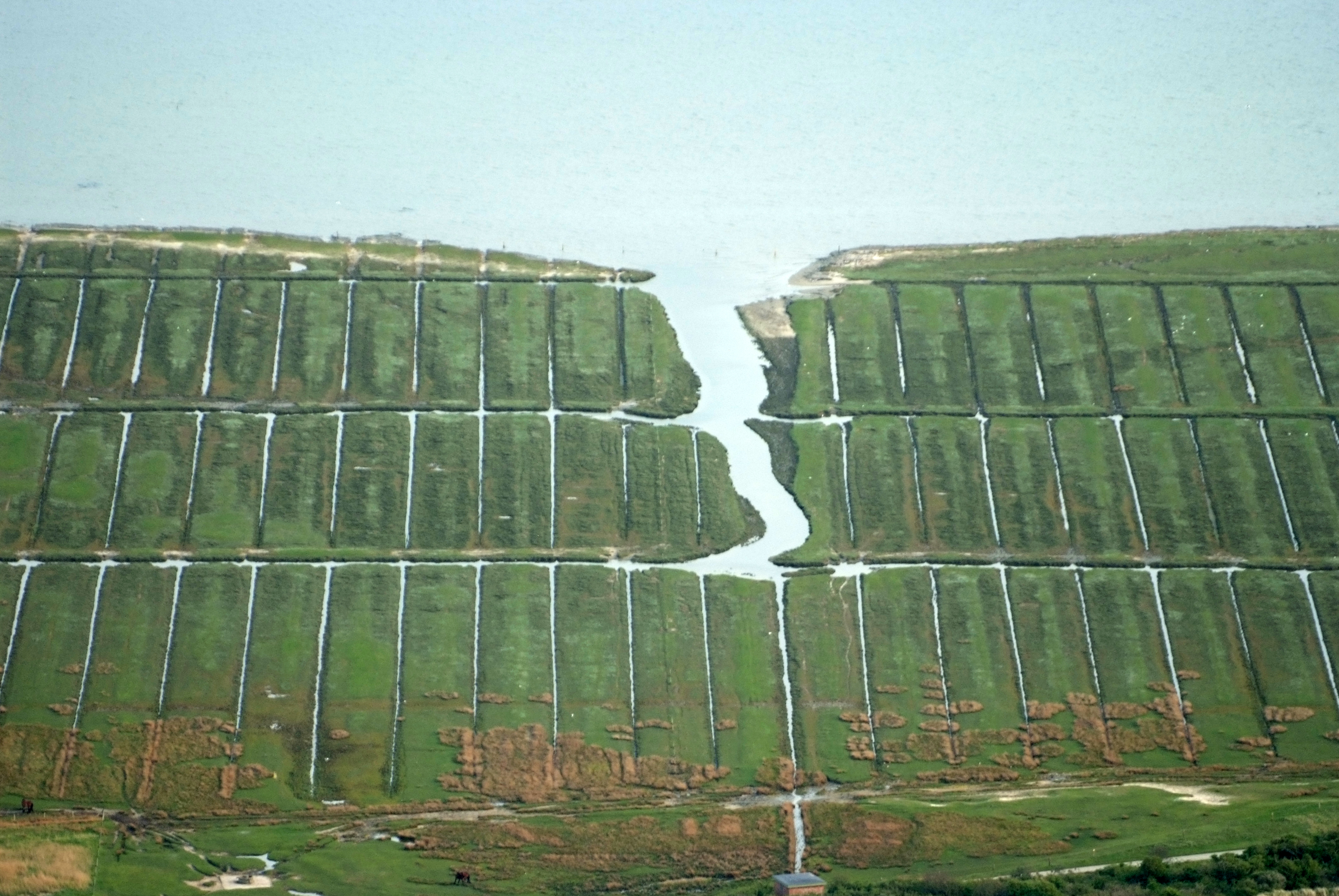 Polder auf Juist Fotoflug vom Flugplatz Nordholz-Spieka über Bremerhaven, Wilhelmshaven und die Ostfriesischen Inseln bis Borkum